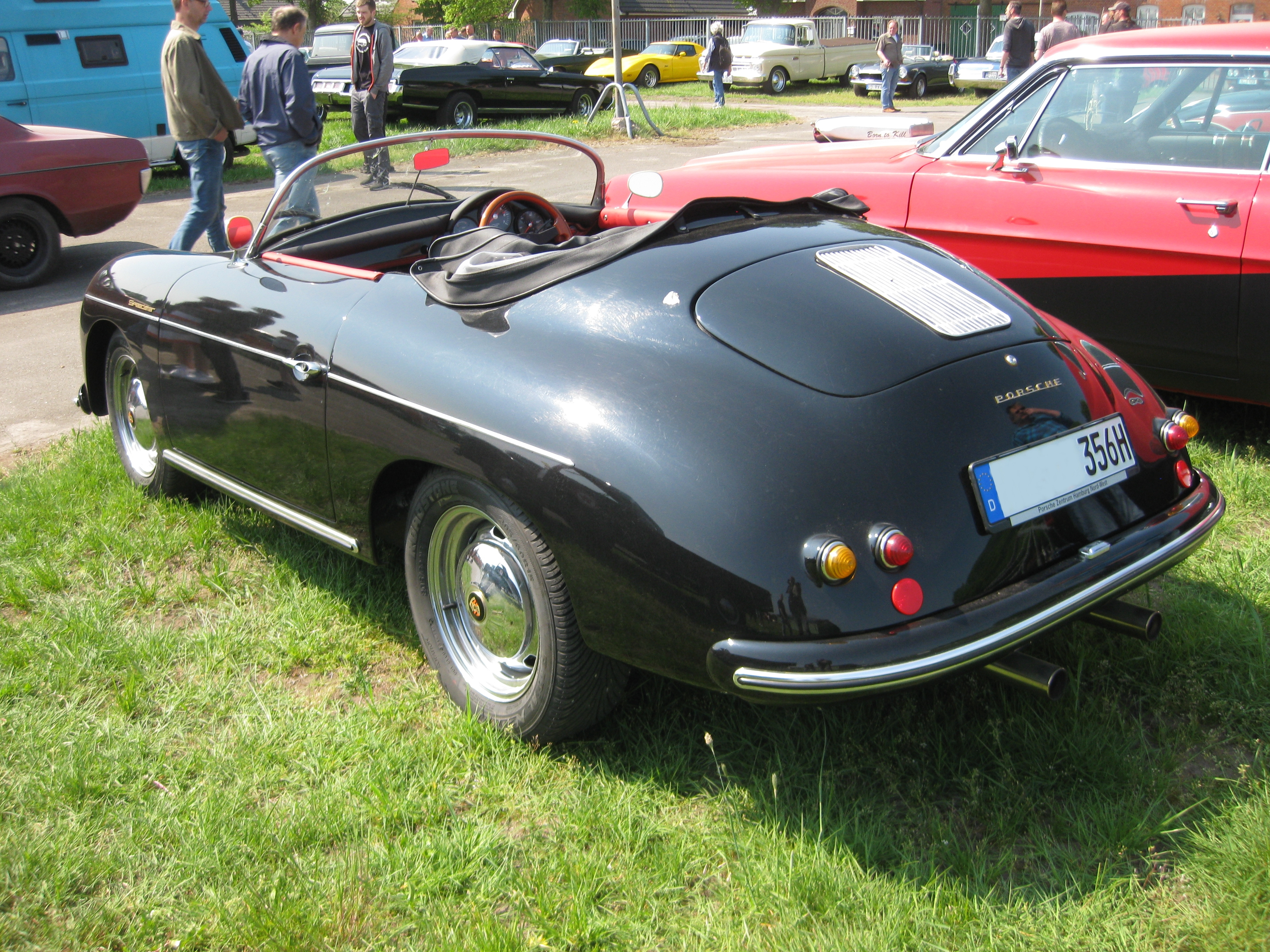 Porsche 956 Spyder Rechtslenker